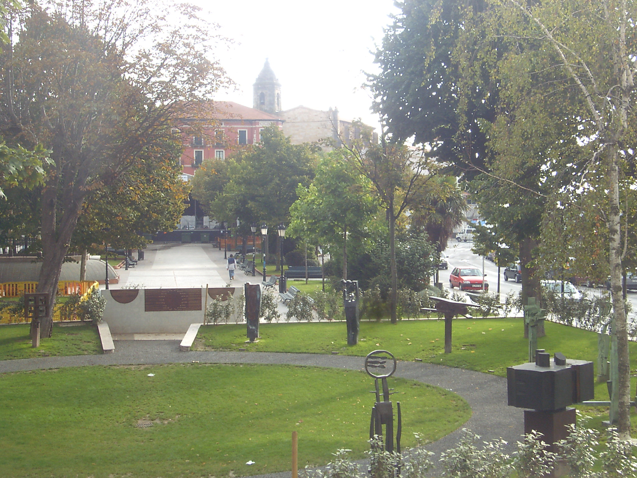 Bermeoko parkean Euskal Kosmogonia Seriea.